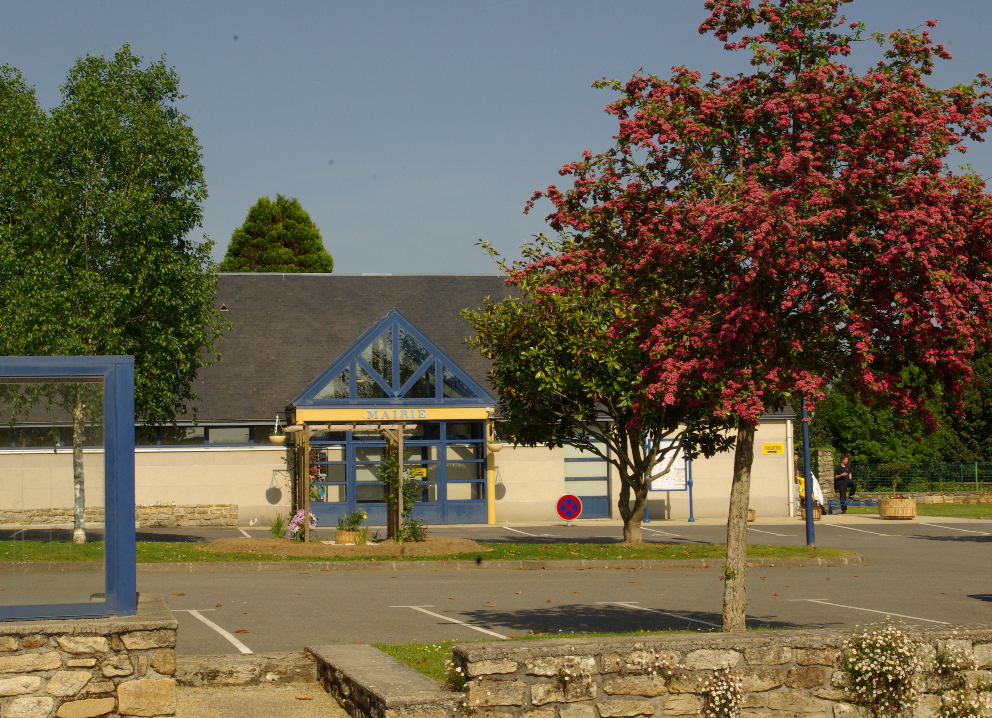 Mairie de Tréméoc